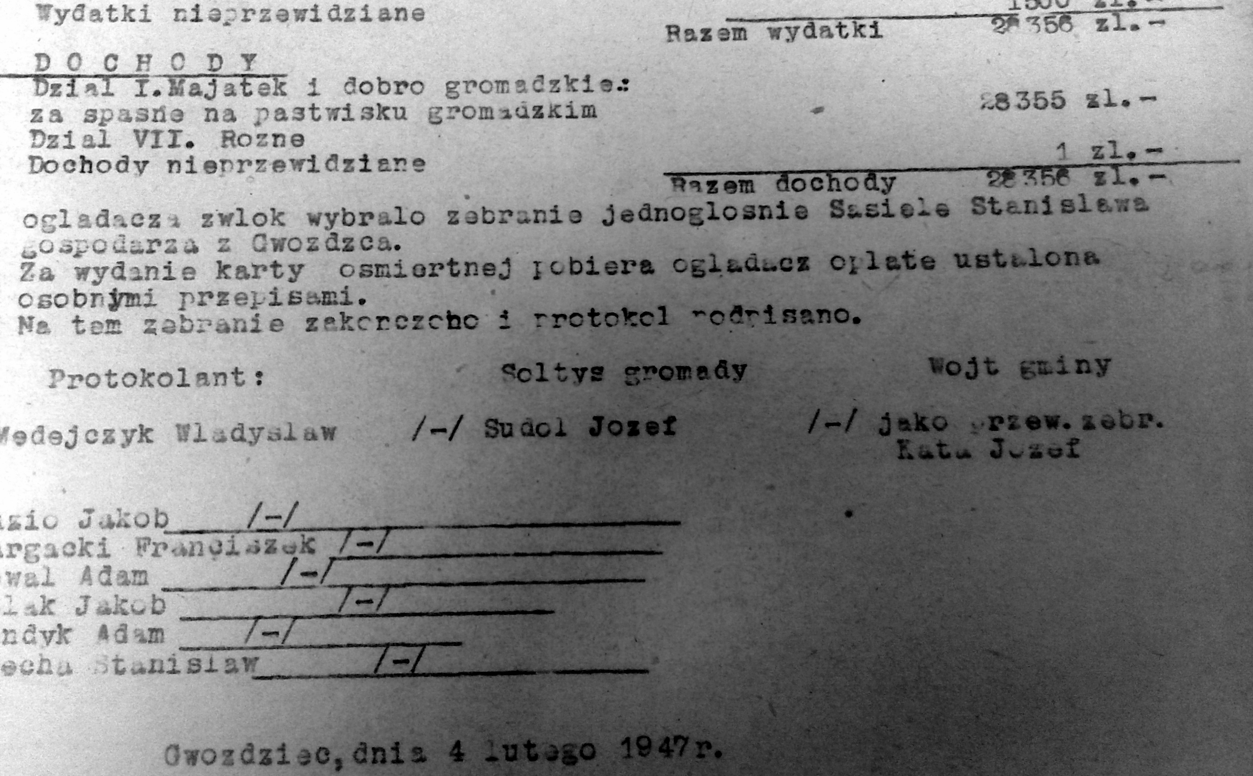 Fragment protokołu zebrania gromadzkiego z 1947 r. dotyczący obsadzenia funkcji oglądacza zwłok